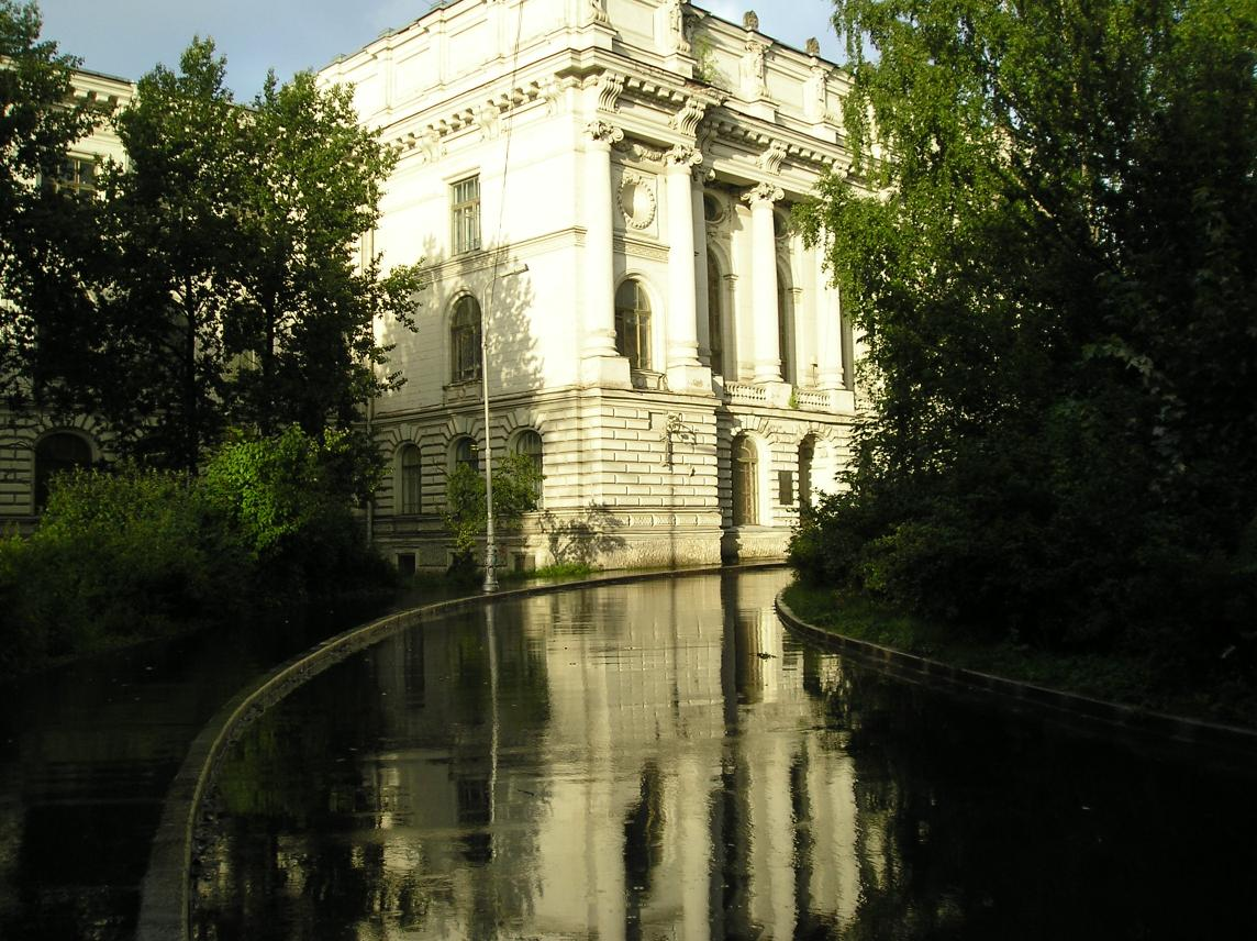 Главное здание, сразу после дождя